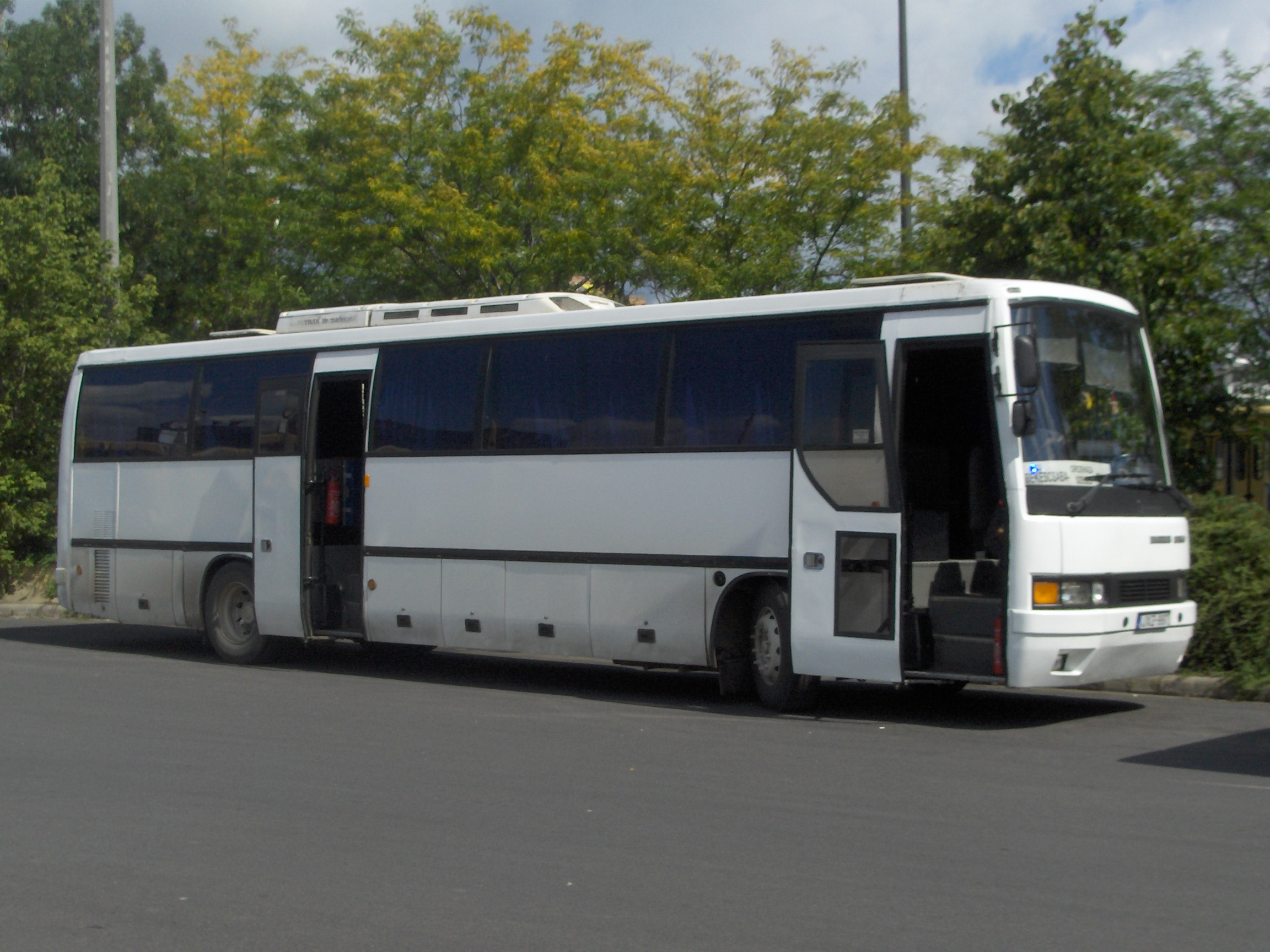 Ikarus 350 Bács Volán